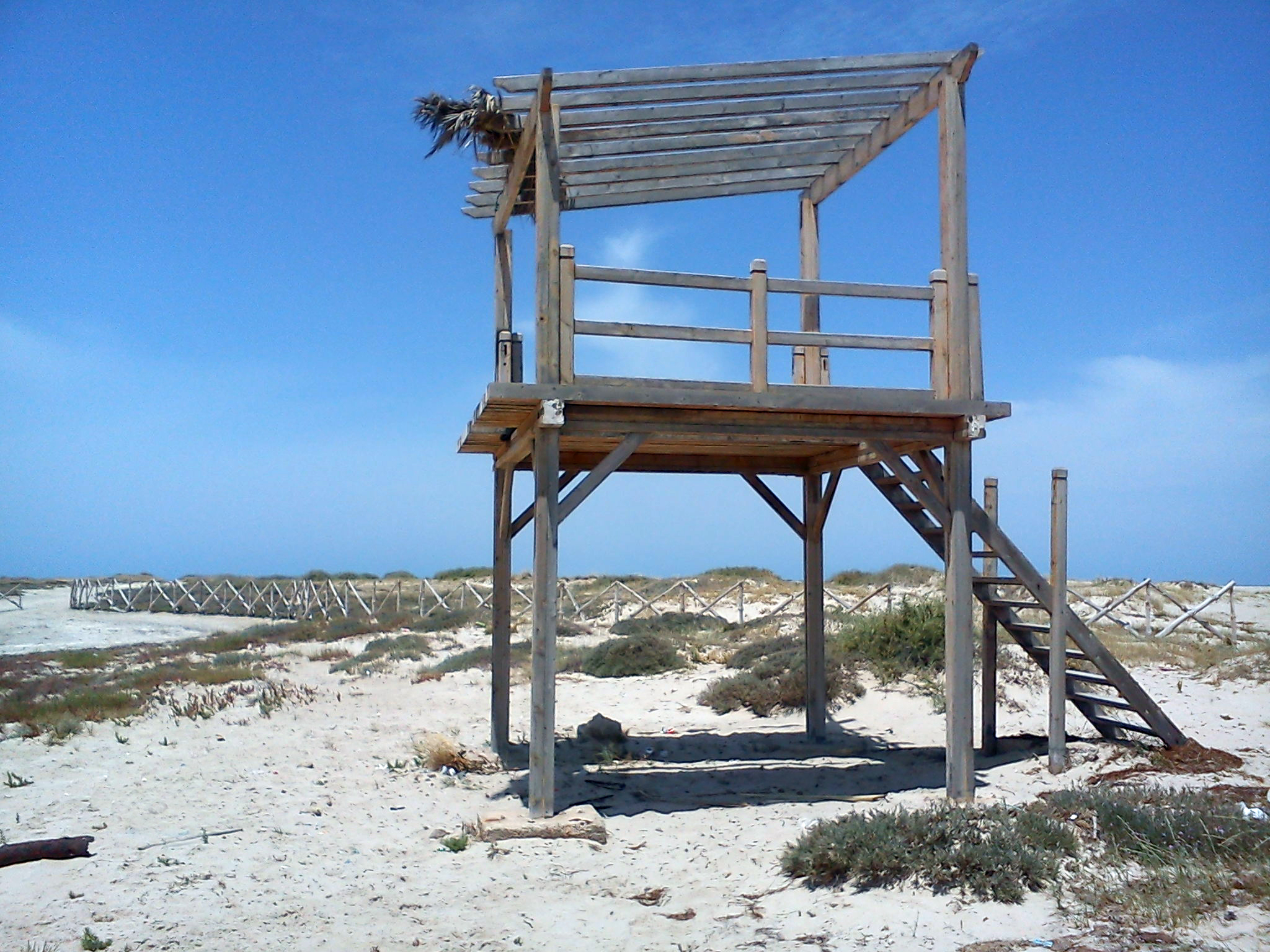 Mirador qui facilite l'observation des oiseaux à la lagune.